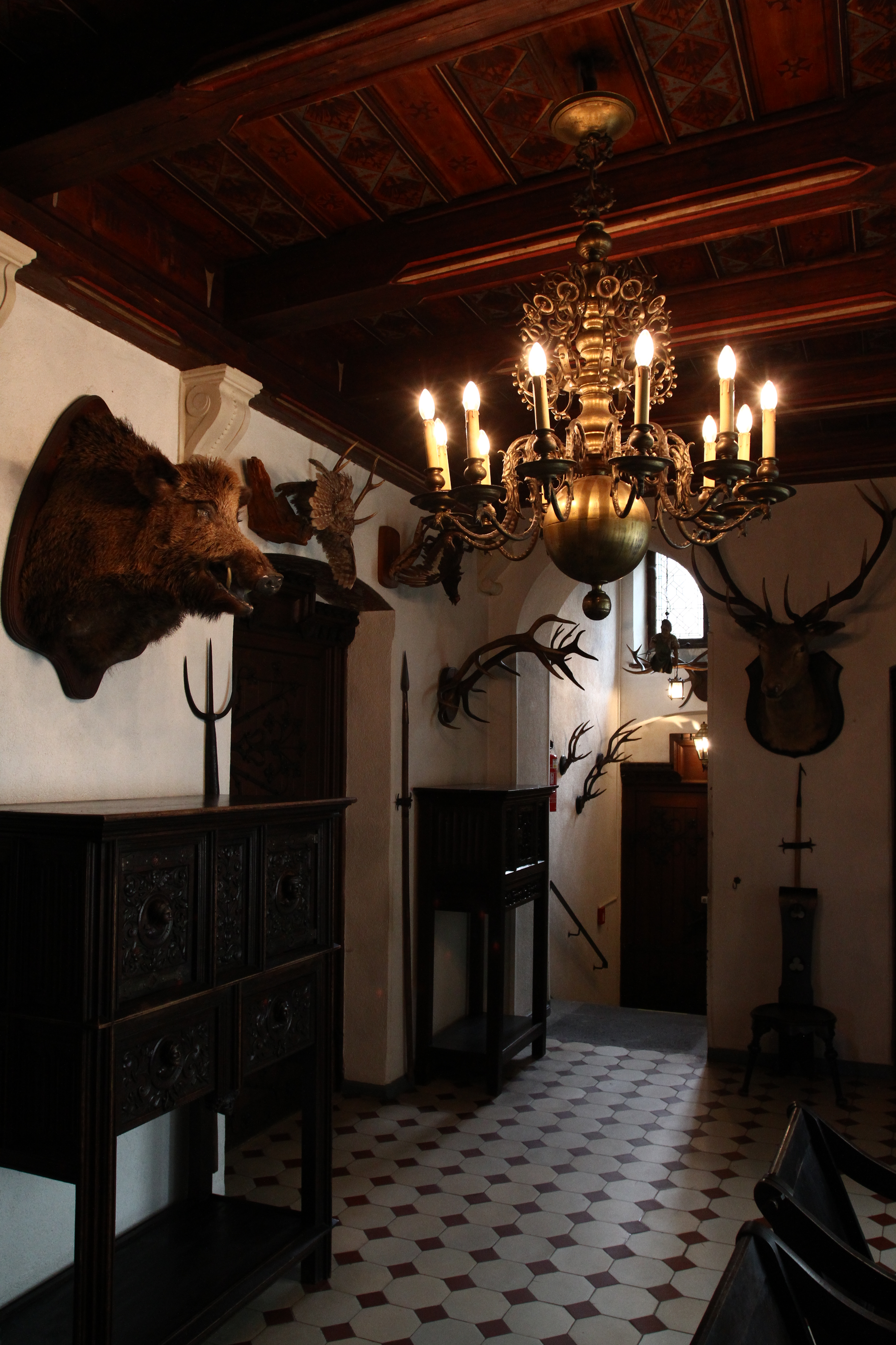 Охотничья, замок Райхсбург